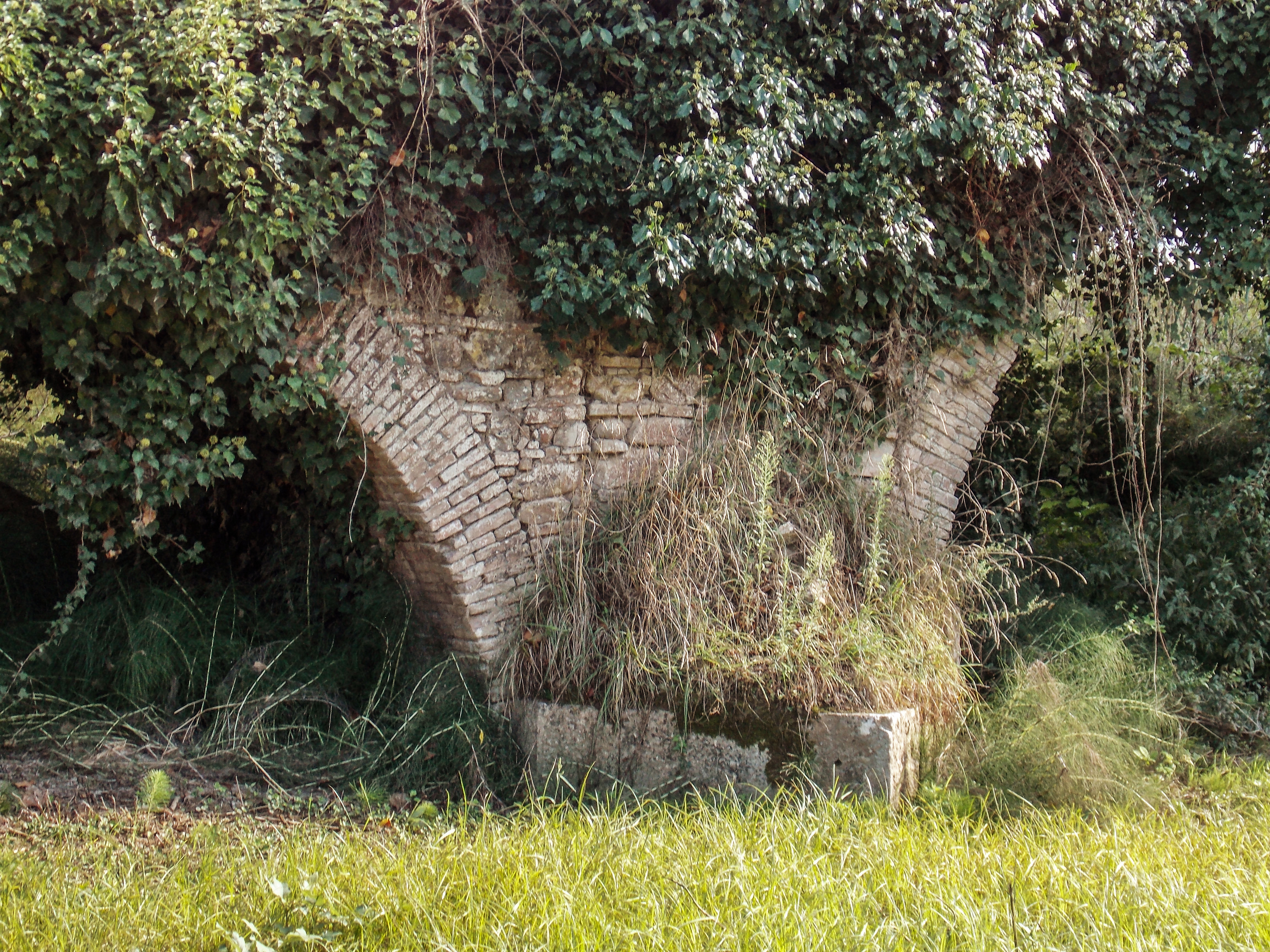 Il ponte delle Serretelle, forse un ponte dell'antica via Appia, presso Benevento